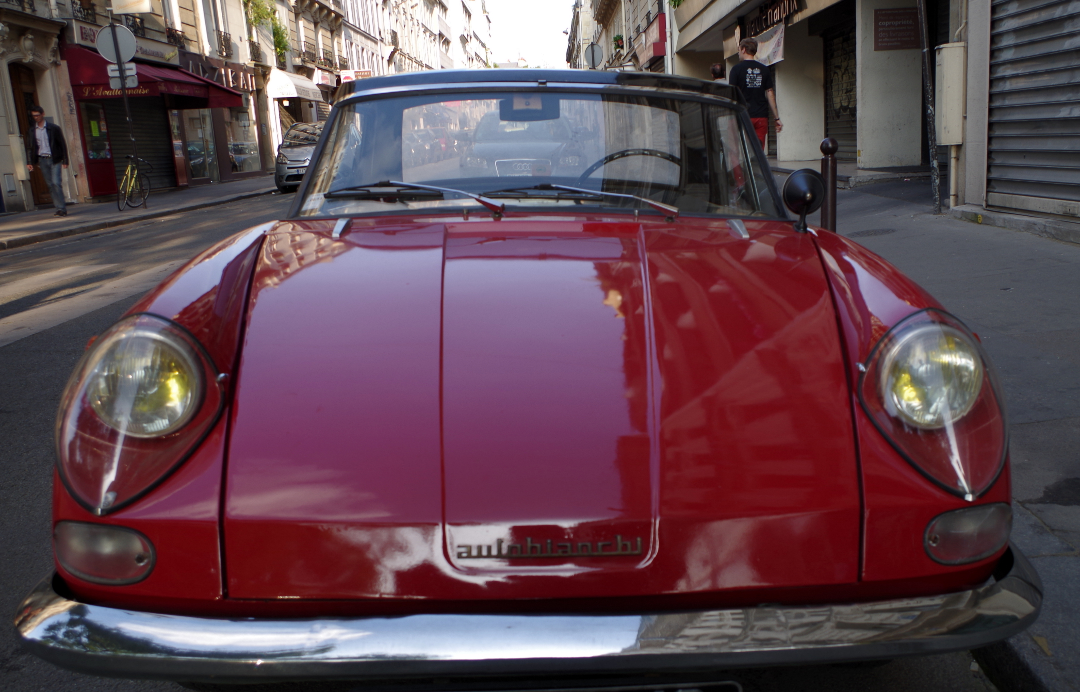 Stellina 800 rouge